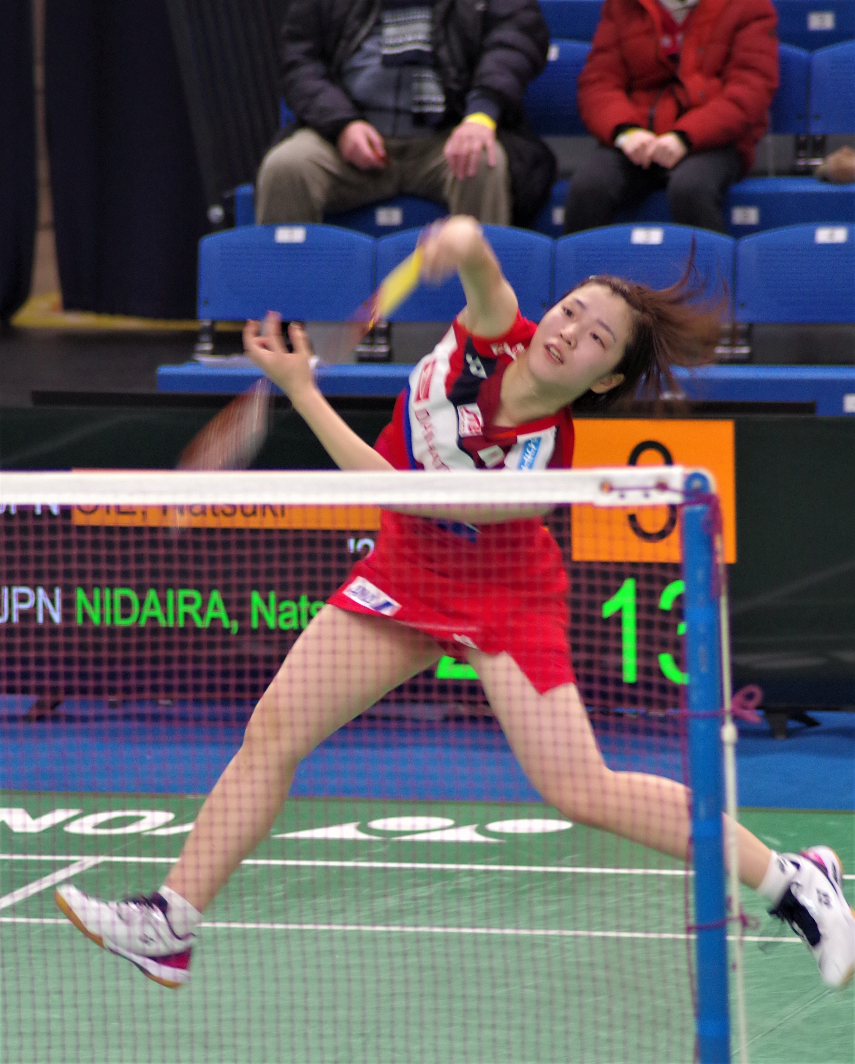 Natsuki Nidaira, Jaapani sulgpallur Tallinnas turniiril YONEX Estonian International 2020